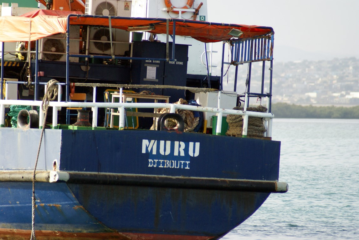 Muru (entinen Mursu) -laiva Djiboutin satamassa tammikuussa 2019.